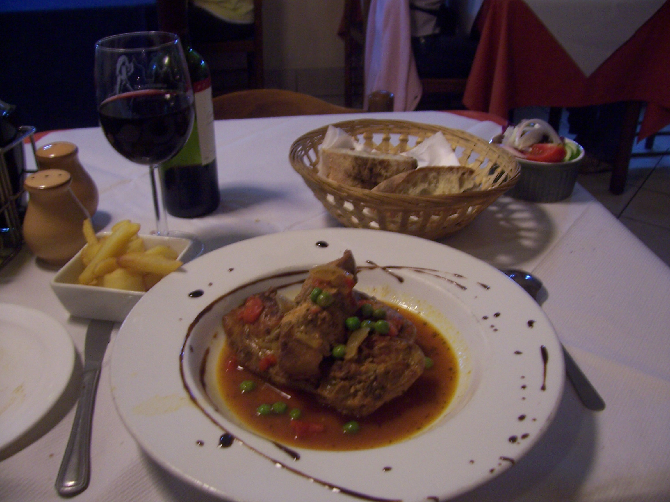 Civet de lapin à Malte